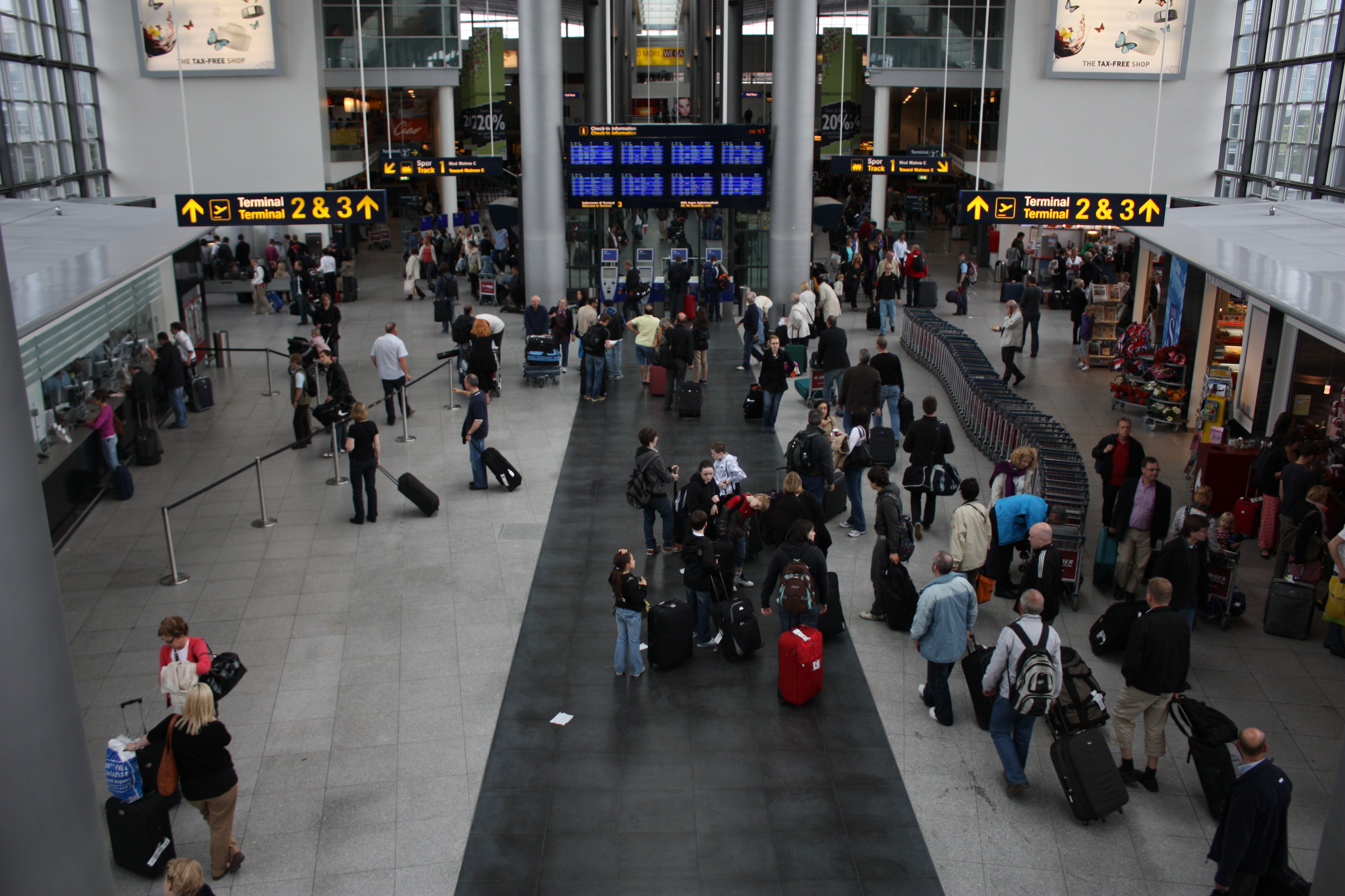 Flughafen Kopenhagen 2009